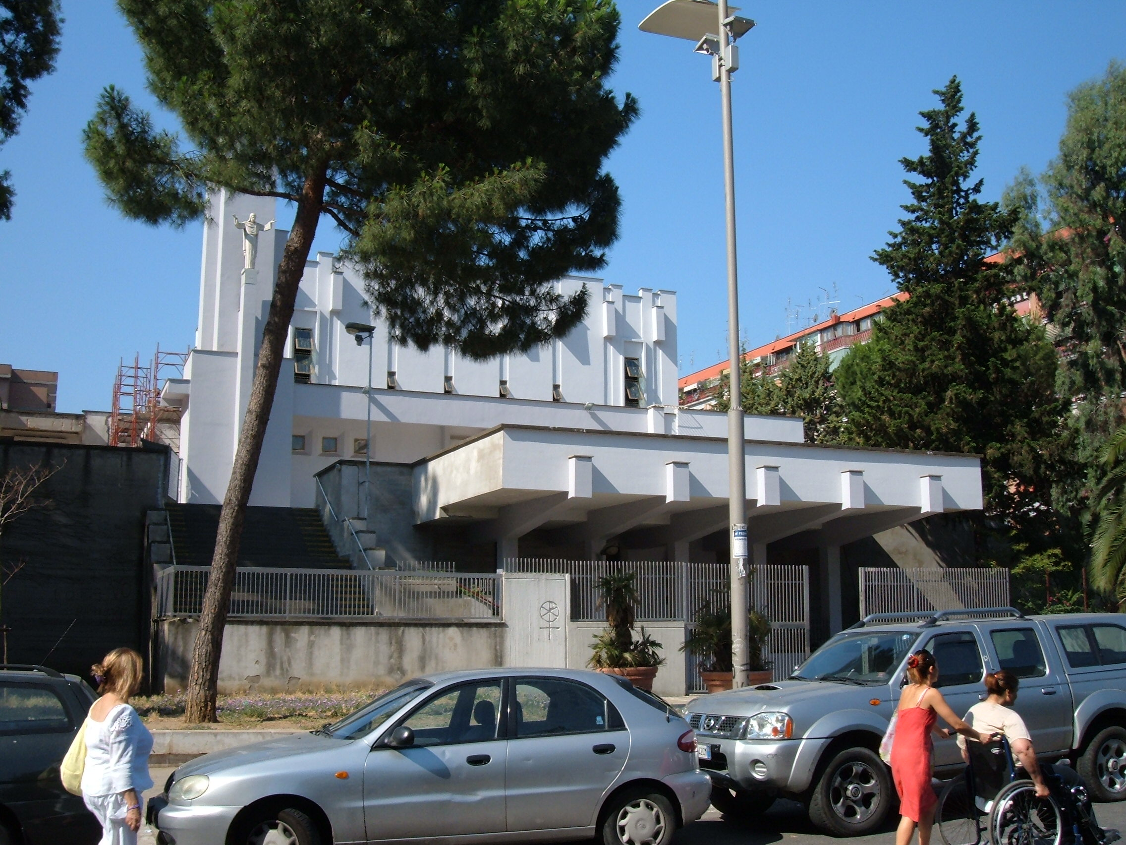 Chiesa di San Gregorio Magno, a Roma, nel quartiere Portuense.